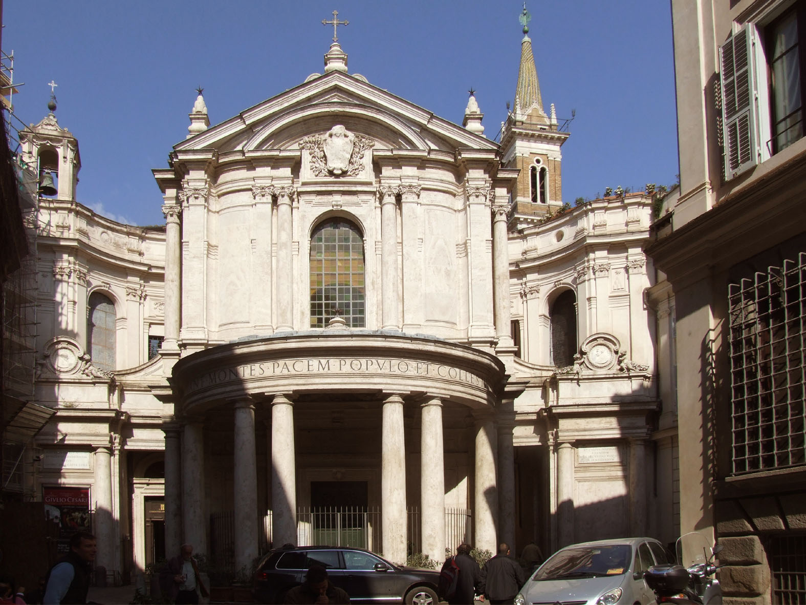 Santa Maria della Pace, Roma, facciata